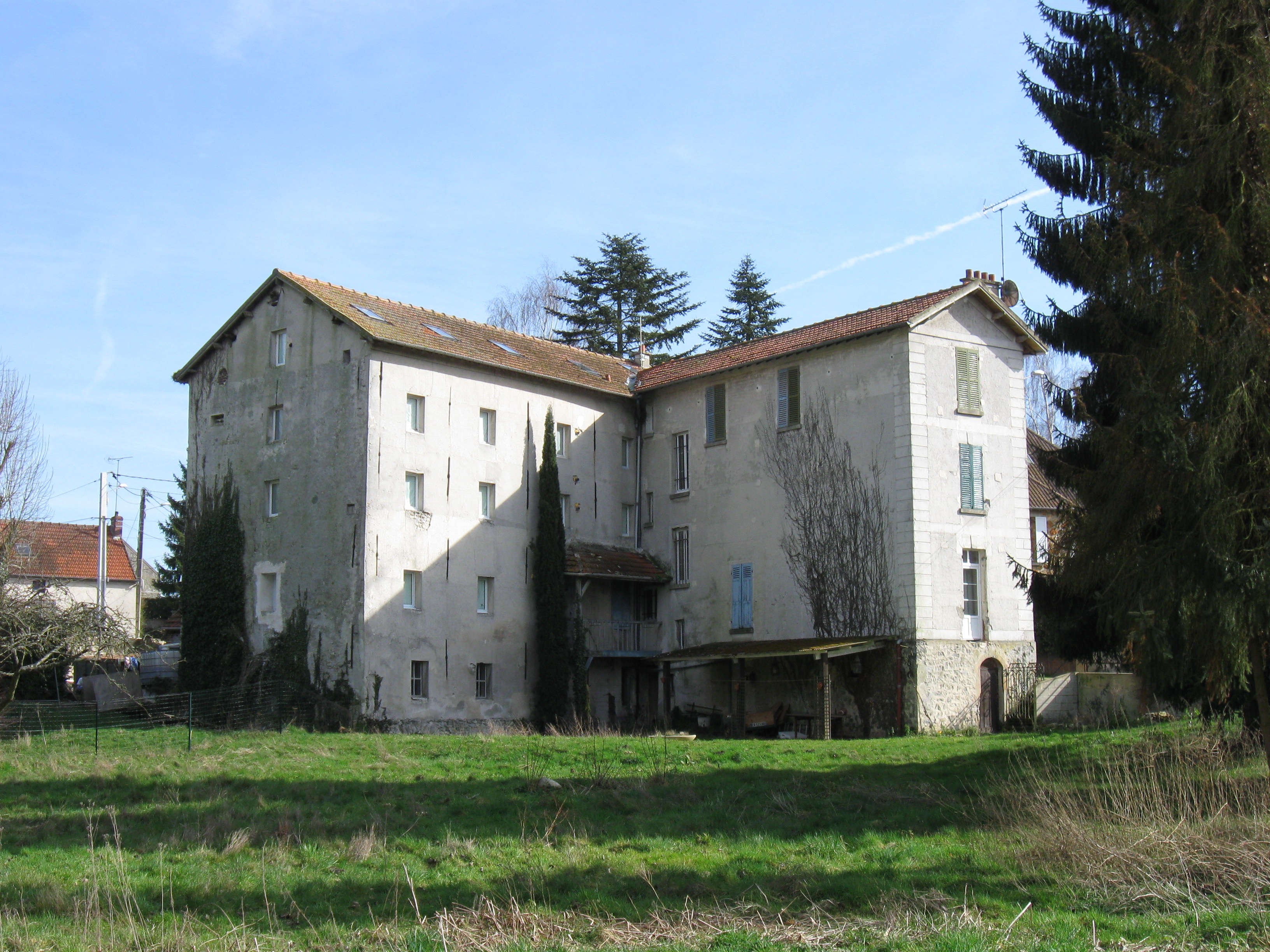 Ancien moulin à eau, la Ramée. (commune de Douy-la-Ramée, Seine et Marne, région Île-de-France).